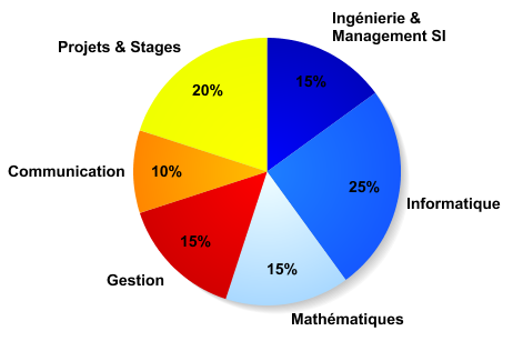 Master MIAGE : graphique des matières enseignées